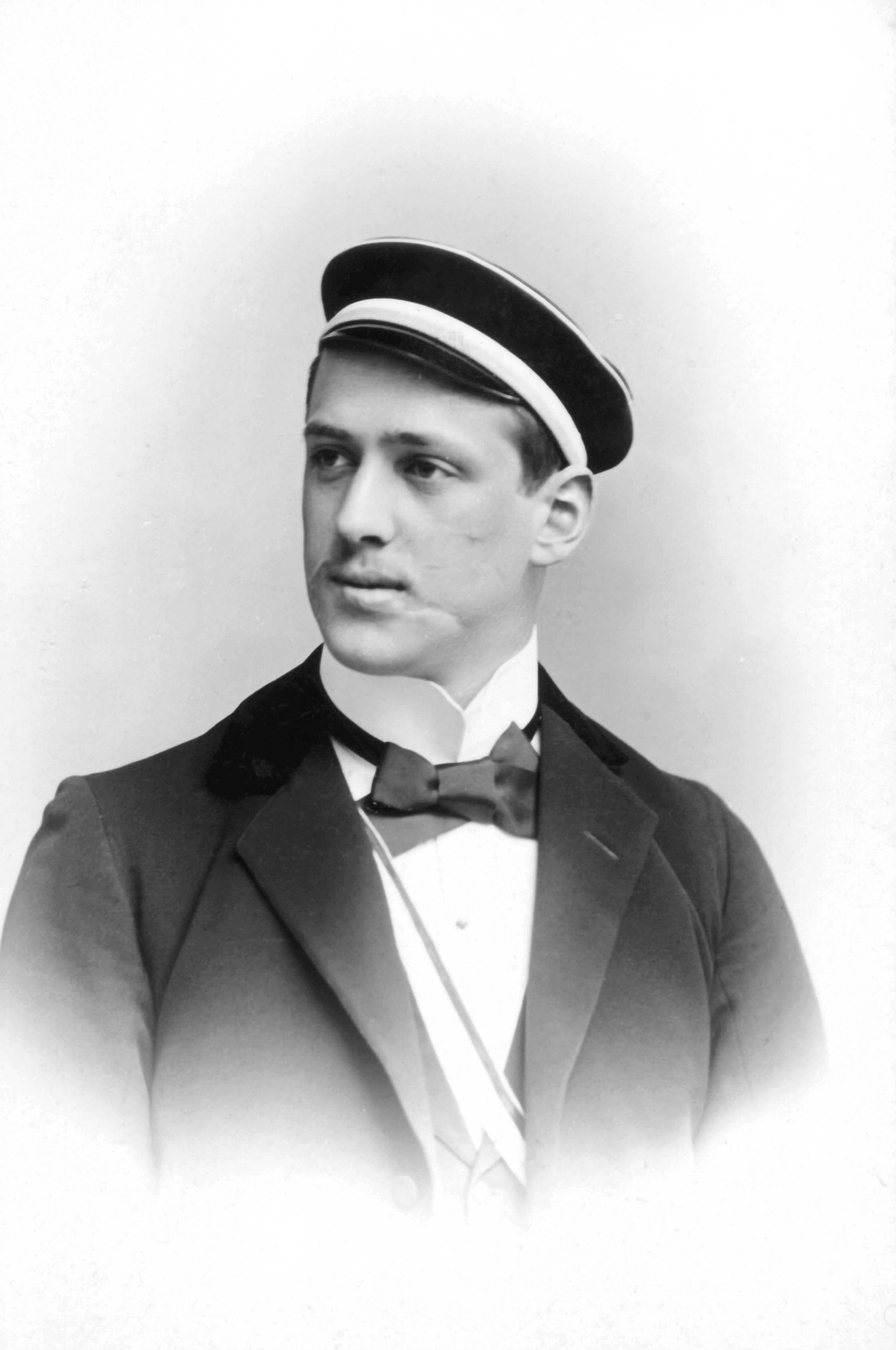 Fotografie von Friedrich Wenner als Corpsbursche der Suevia München